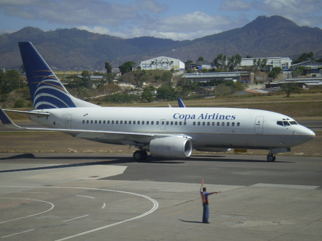 Vista do Pátio de Aeronaves do Aeroporto Internacional Toncontín Copa Airlines